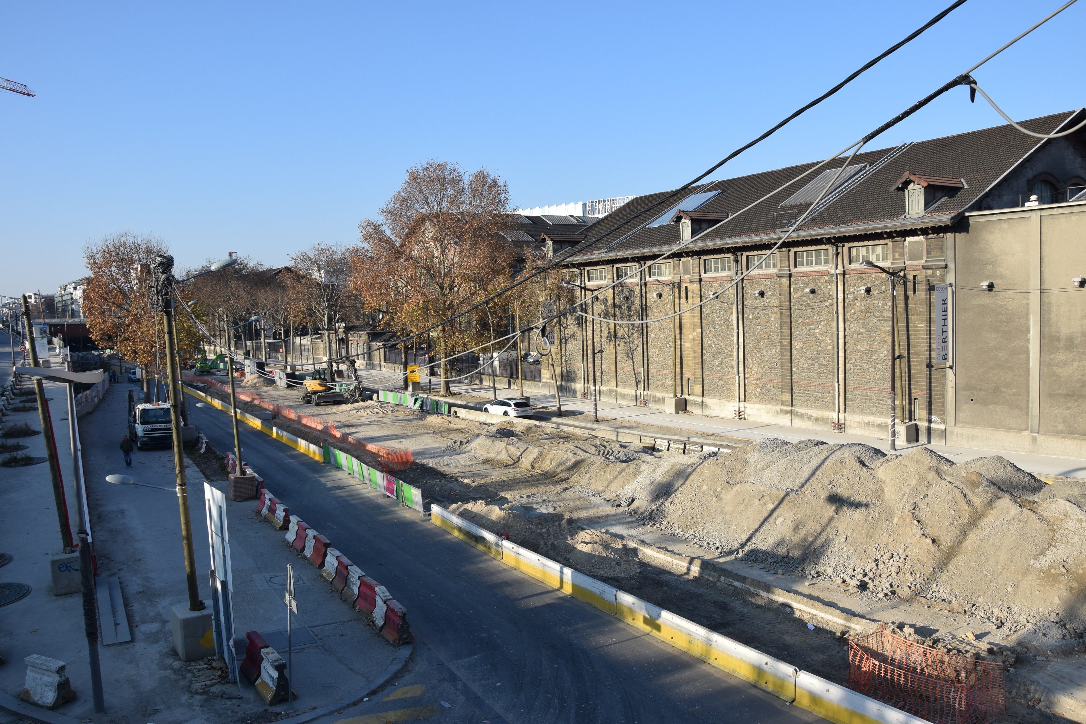 Travaux d'extension de la ligne 3b du tramway d'Île-de-France. La photo est prise depuis le parc Martin Luther King vers le boulevard Berthier et les ateliers Berthier de l'Odéon-Théâtre de l'Europe, proche de la future station Porte de Clichy.